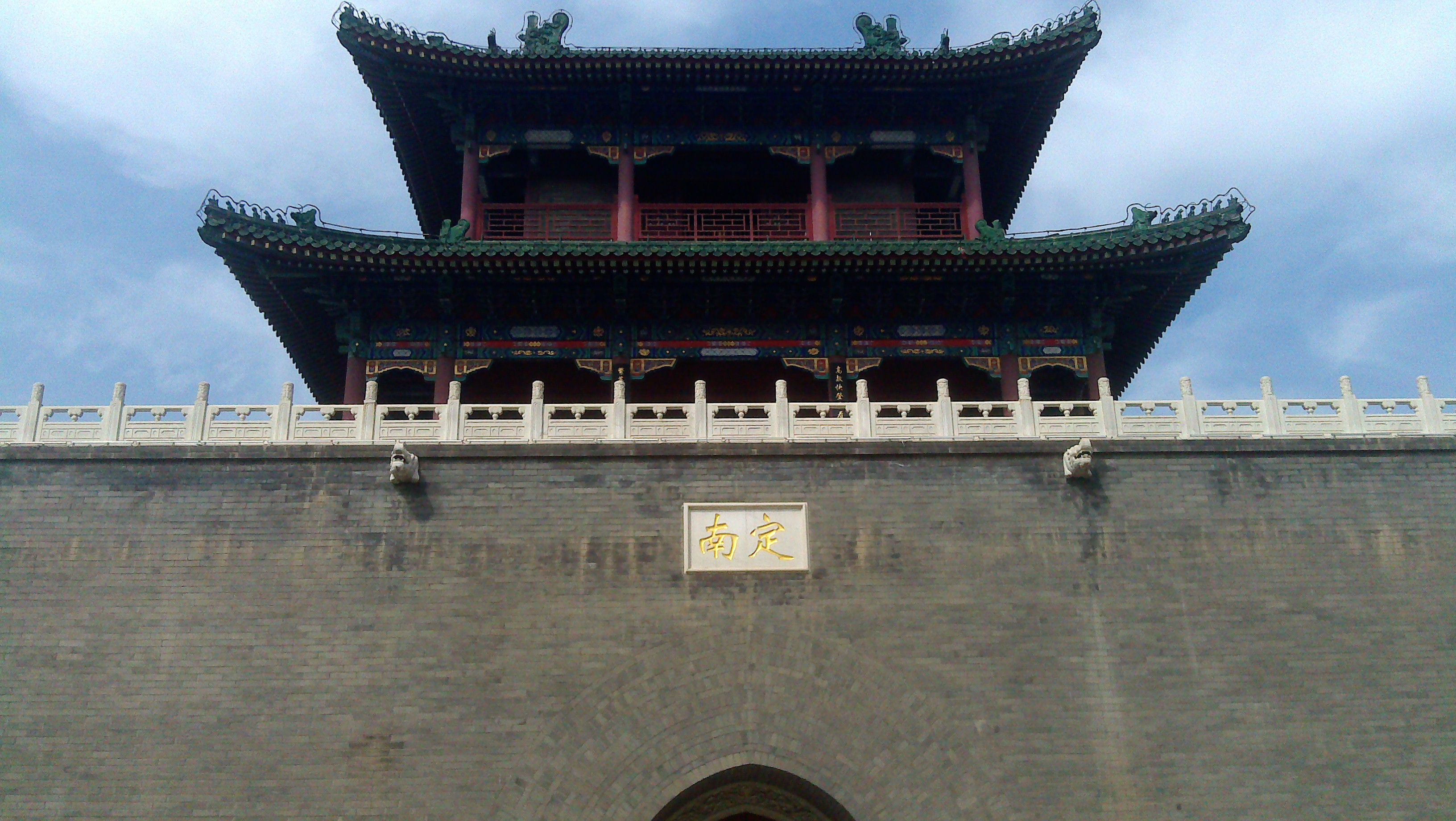 天津衛鼓樓南門仰拍攝影